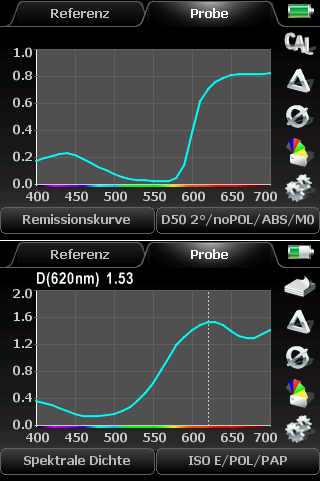 Gemessene Spektralkurven in den beiden ISO-Messmodi eines Spektraldensitometers Techkon SpectroDens, Generation 2012. Farb-LCD-Foto oben: farbmetrischer Modus (ISO 13655:2009 „M0“: physikalisch erzeugte Normlichtart D50 für 2°-Normalbeobachter, „noPOL“ ohne Polarisationsfilter, „ABS“ auf Absolutweiß kalibriert) – spektraler Remissionsgrad einer mit der Prozessdruckfarbe Magenta gedruckten Fläche. Farb-LCD-Foto unten: densitometrischer Modus (ISO 13655:2009 „M3“: „ISO E“ Filterstatus E, „POL“ mit Polarisationsfilter, „PAP“ auf Papierweiß kalibriert) – spektrale Volltondichte einer mit roter Sonderfarbe gedruckten Fläche – Dichtewert 1,53 bei einer Wellenlänge (globales Kurvenmaximum) von 620 nm.